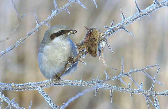 Lanius excubitor